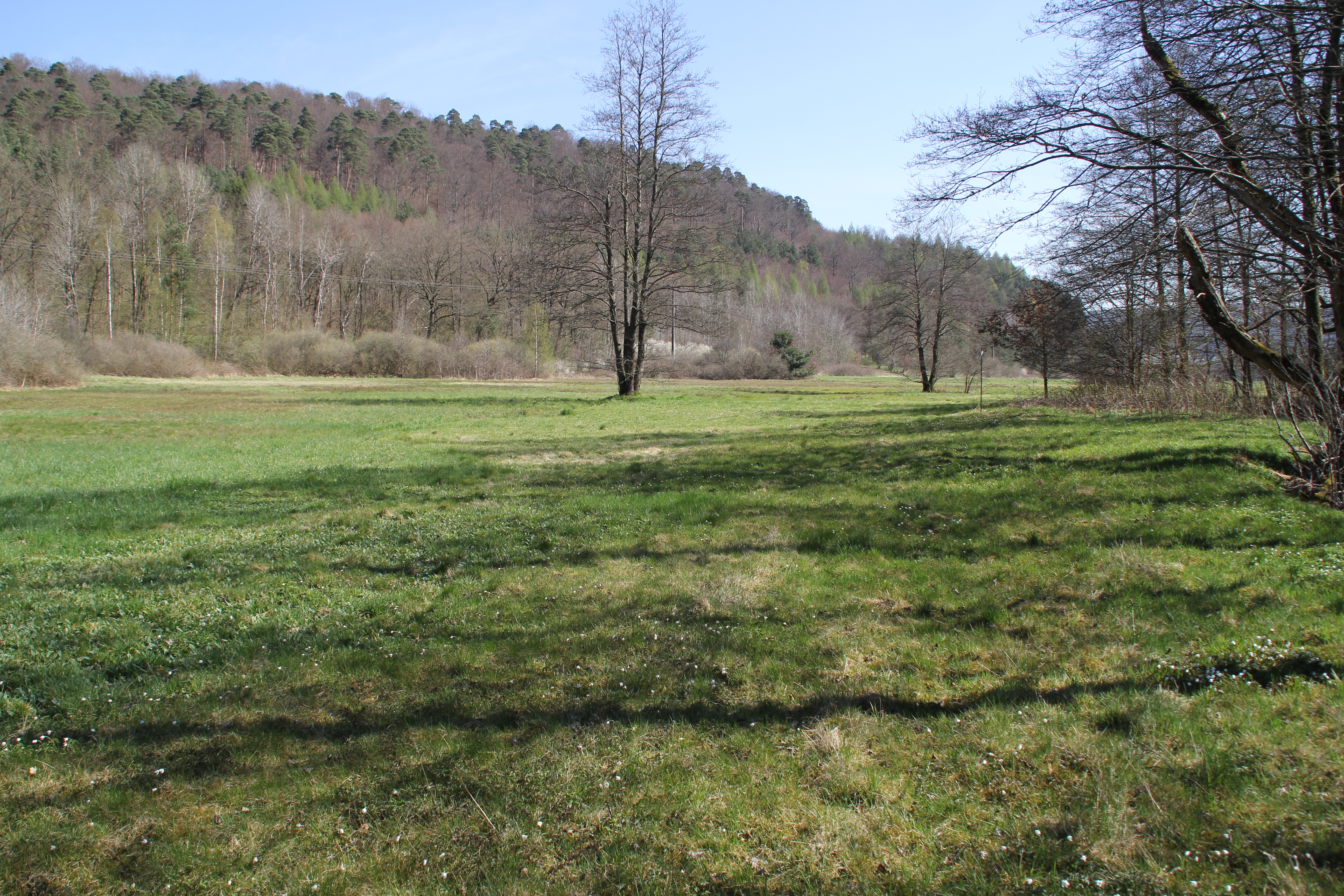 Das Naturschutzgebiet Spessartwiesen bei Neuhütten